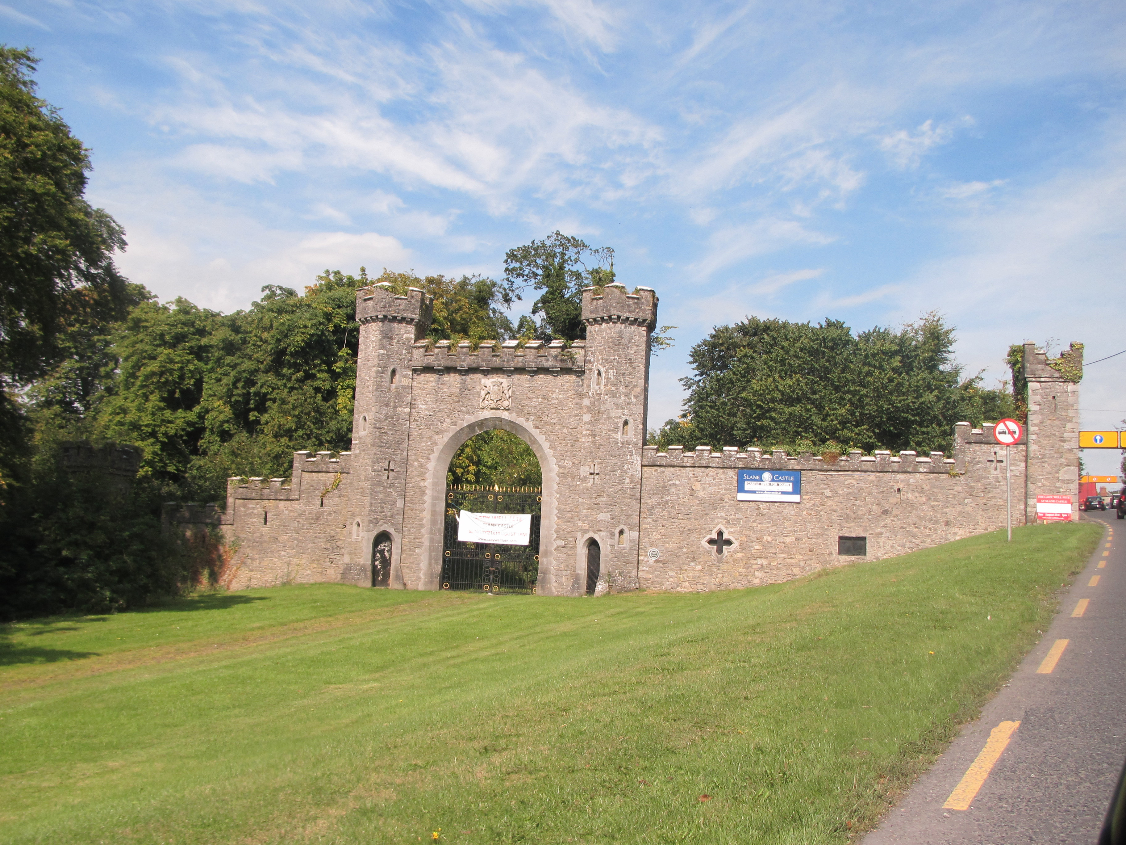 Slane Castle by paride